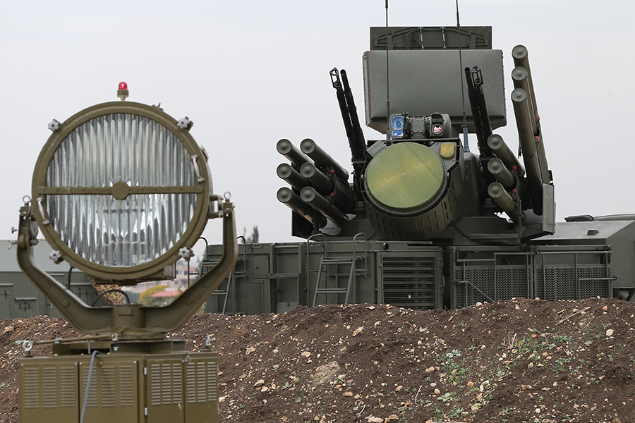 Будни авиагруппы ВКС РФ на аэродроме «Хмеймим» (Сирийская Арабская Республика)